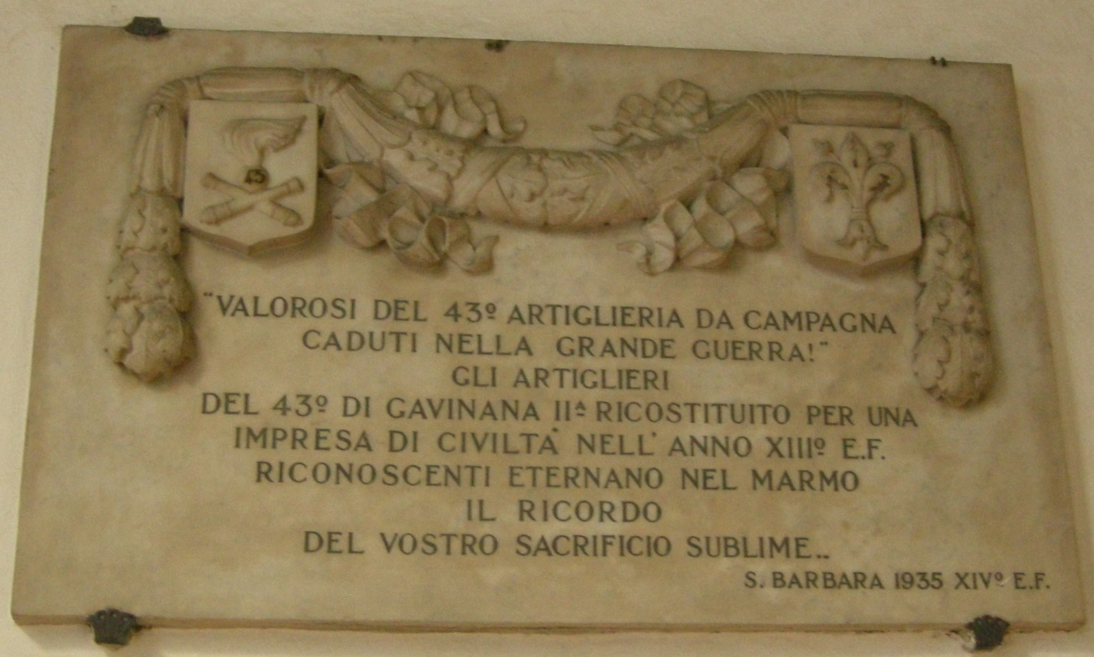 Caserna antonio baldissera, cortile, targa 43ma artiglieria